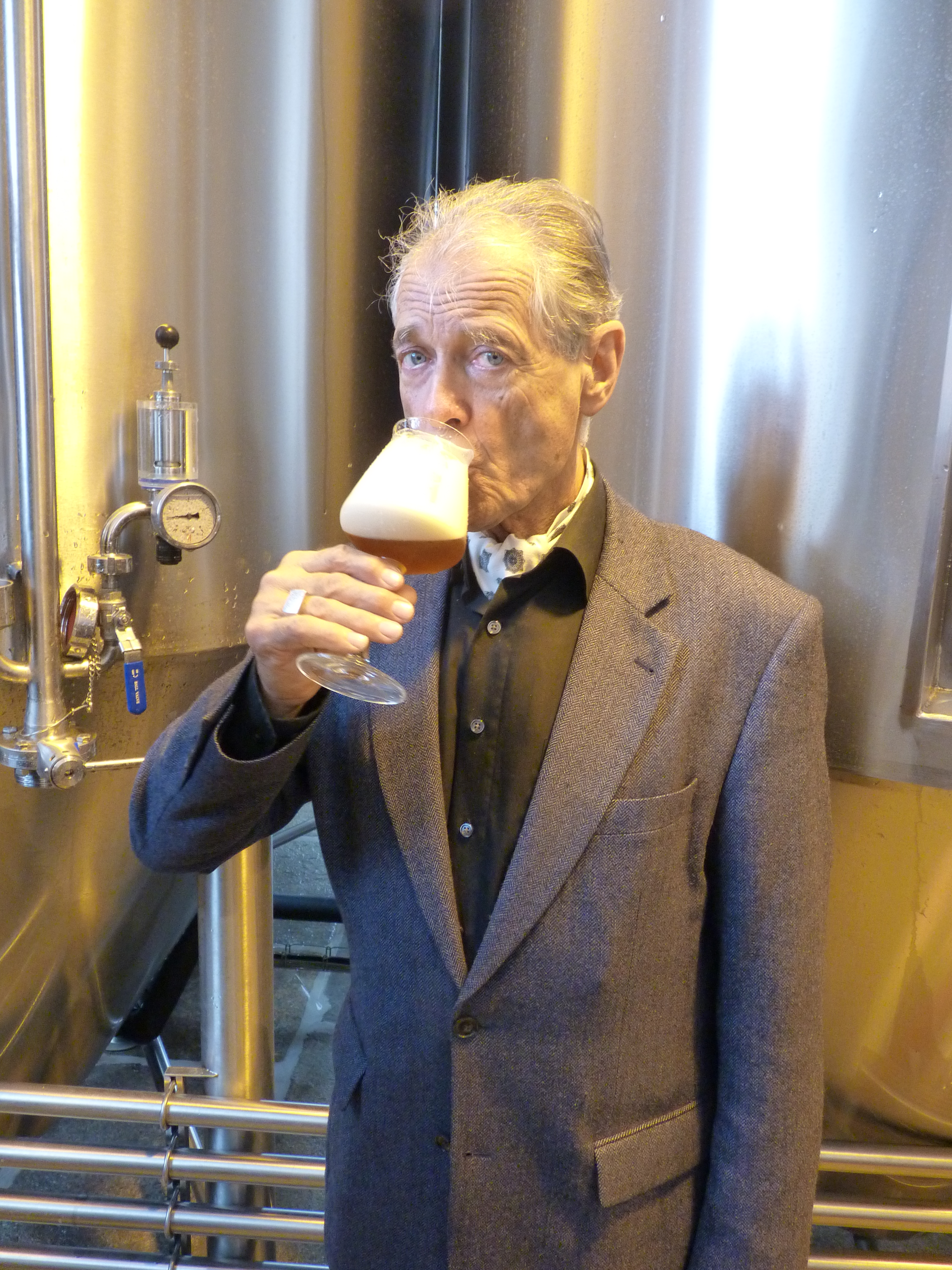 František Krakeš v Parním pivovaru Hauskrecht při degustaci piva